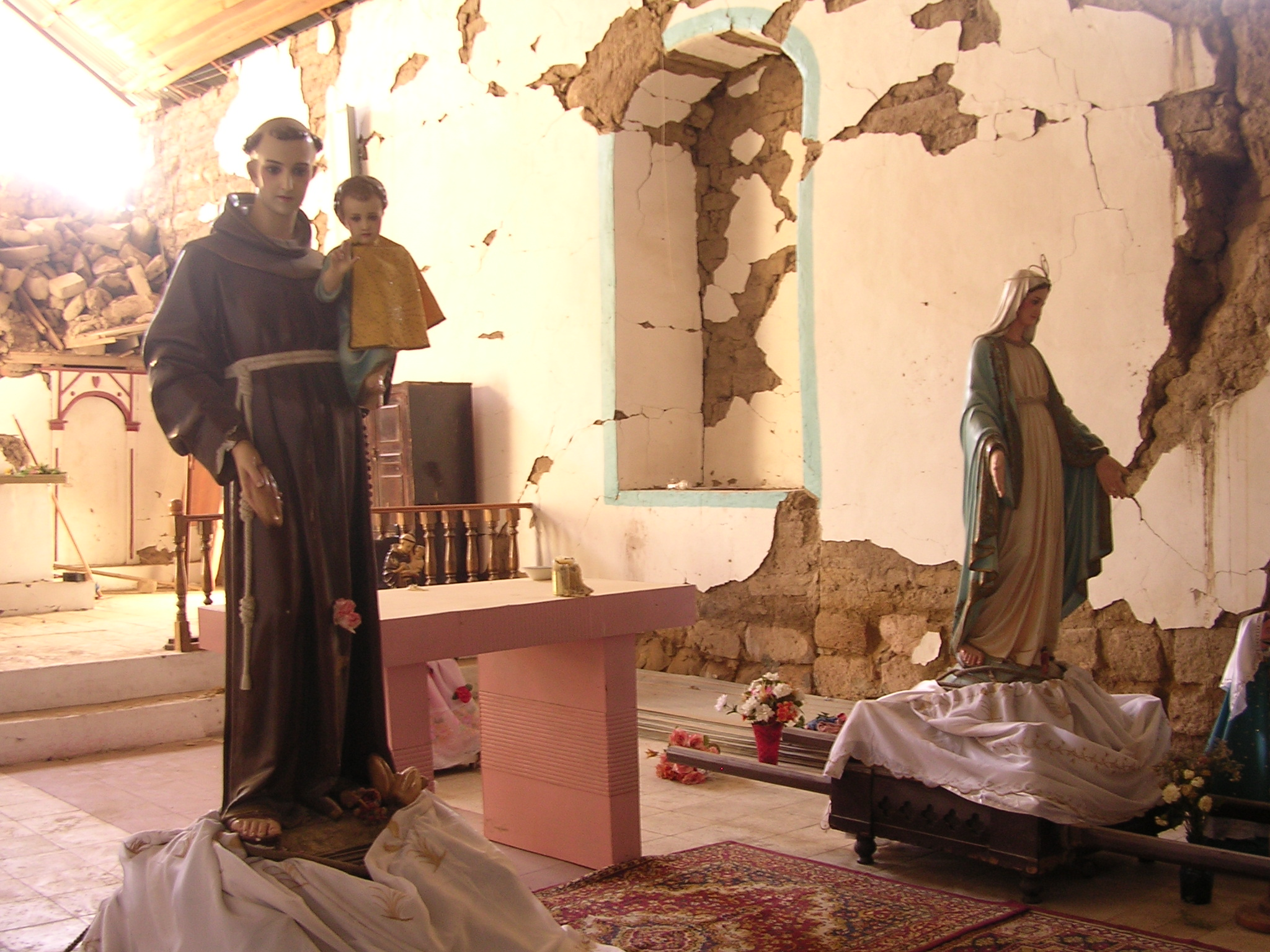 San Antonio y Virgen de Lourdes, Patronos del pueblo de Mocha, en la comuna de Huara, región de Tarapacá.